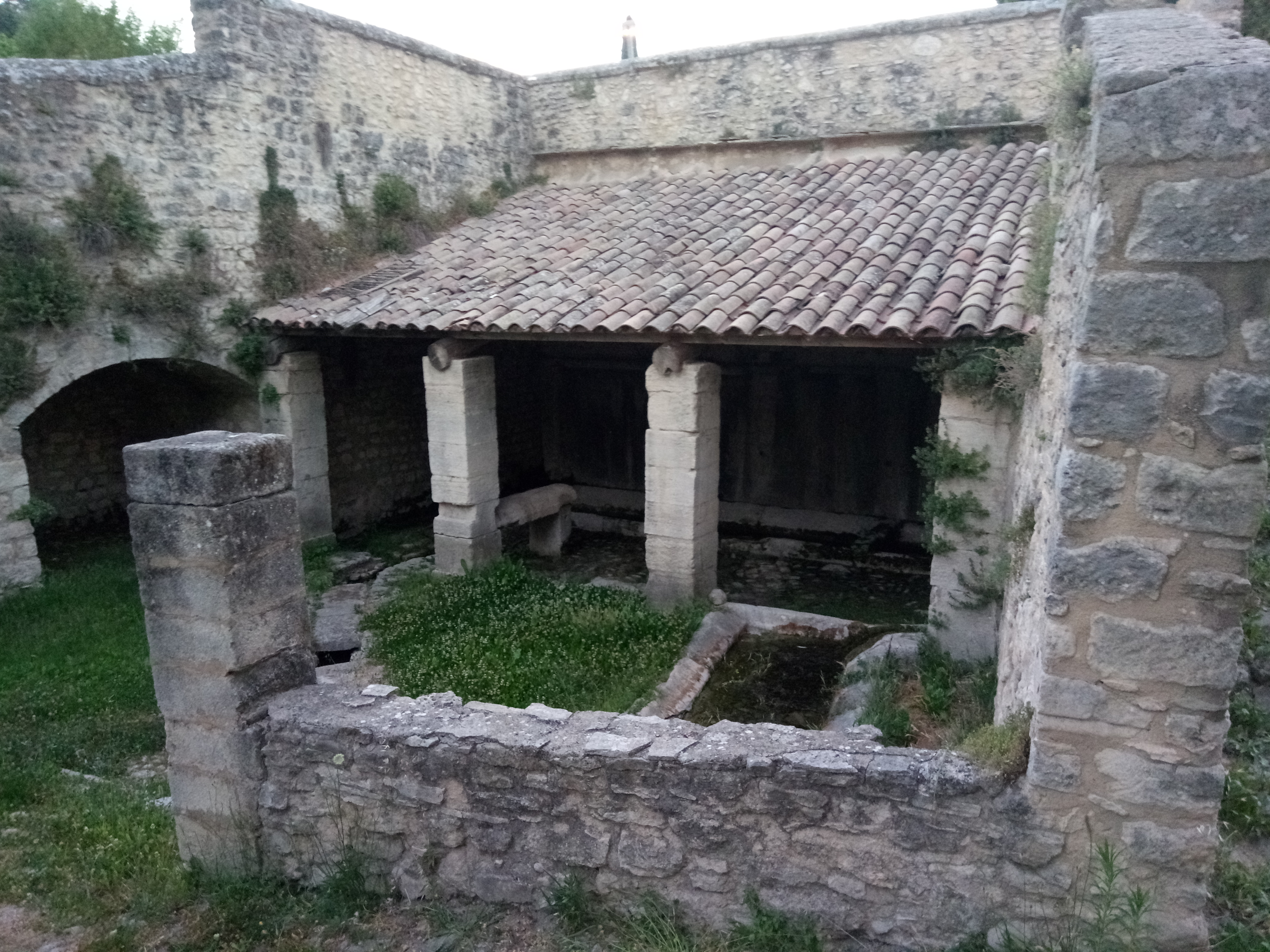 La "Bonne fontaine", site de la Villa Betorrida, Forcalquier, Alpes de Haute-Provence